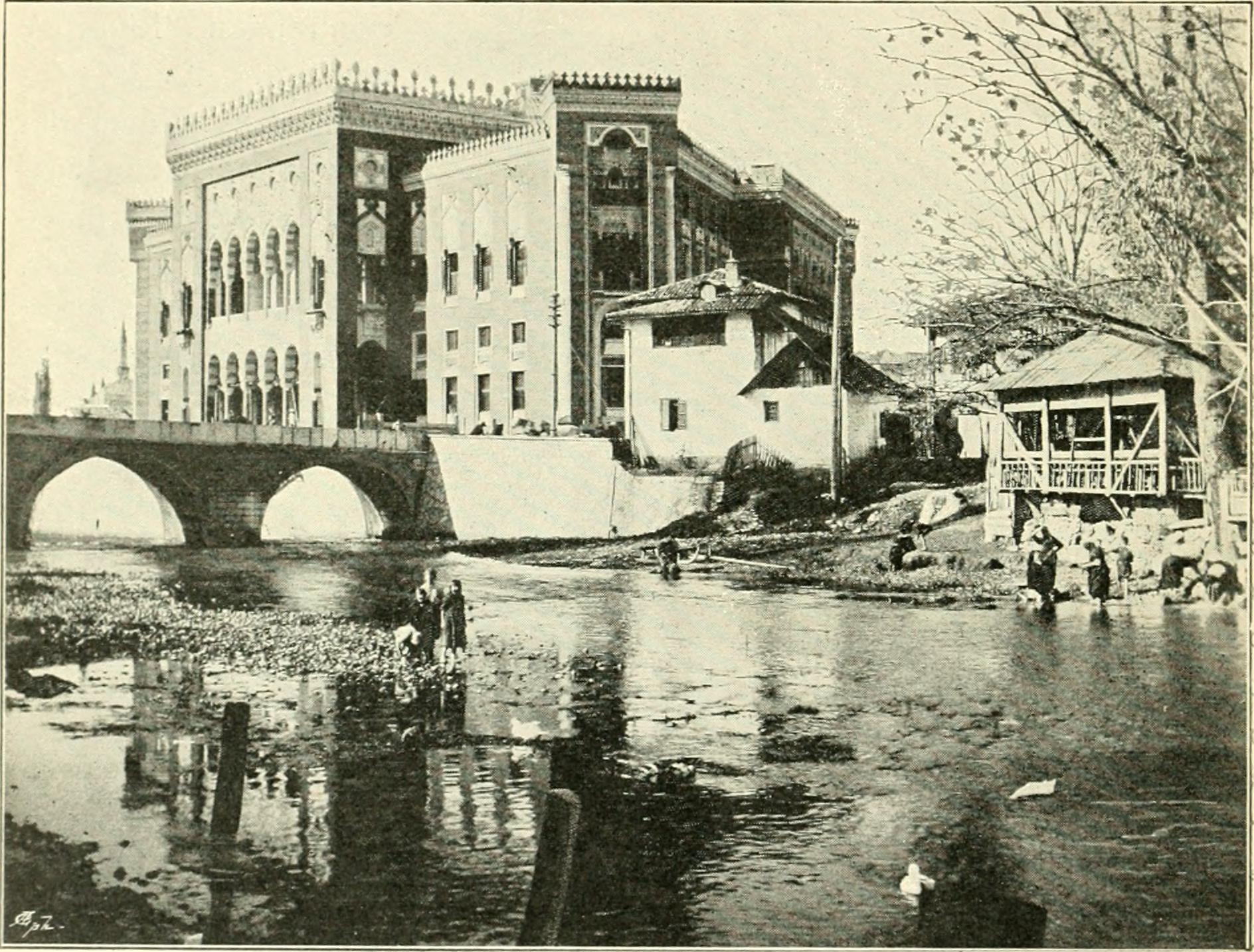 Identifier: durchbosnienundd00rennuoft Title: Durch Bosnien und die Herzegovina kreuz und quer; Wanderungen Year: 1897 (1890s) Authors: Renner, Heinrich Subjects: Bosnia and Hercegovina -- Description and travel Publisher: Berlin D. Reimer (E. Vohsen) View Book Page: Book Viewer About This Book: Catalog Entry View All Images: All Images From Book Click here to view book online to see this illustration in context in a browseable online version of this book. Text Appearing Before Image: Motiv an der Begova-Dzamjija. - 6: Gegenwärtiger Bürgermeister ist Mehmed Beg Kapetanovic, einer der reicheren Grundbesitzer des Landes, der sich schon ä la franca kleidet. Die anlässlich des Archäologenkongresses in Sarajevo weilenden Gelehrten hatten Gelegenheit, ihn in seinem Hause bei echt orientalischer Gastfreundschaft kennen zu lernen; die Wenigsten aber werden gewusst haben, dass Mehmed Beg ein Dichter und dass auch ein Band bosnischer Sprüchwörter von ihm unter dem Titel »Xarodno Blago« erschienen ist. DieseS ammlung von 4300 Sprüchwörtern ist ein imponirendes Stück jahre langer Text Appearing After Image: Rathhaus in Sarajevo. unverdrossener Arbeit. Die Vorrede zu dem Buche ist ein litterarisches Meisterstück voll Kraft und Schönheit des sprachlichen Ausdruckes; sie selbst gleicht einem Strausse aus heimischen Blüthen der, mit bosnischen Sprüchlein gebunden, den Leser erfrischt und zur Lektüre einladet. Es dürfte vielleicht nicht unangemessen erscheinen, einige der gebräuchlichsten Spruch worter hier wiederzugeben, da sie ein Spiegelbild des Volkscharakters bieten. 5t selbstverständlich, dass das Leben und Treiben der Thiere, ganz besonders der Hausthiere, zu Beobachtungen und zu Vergleichen den meisten Anlass giebt. So heisst es vom Hunde: Der Hund bellt auch auf den Kaiser« oder »Auf den Armen bellen auch die Hunde. Auch sagt man vergleichsweise vom Geduldigen: »Er bellt erst, wenn man ihm auf den Schweif 68 —